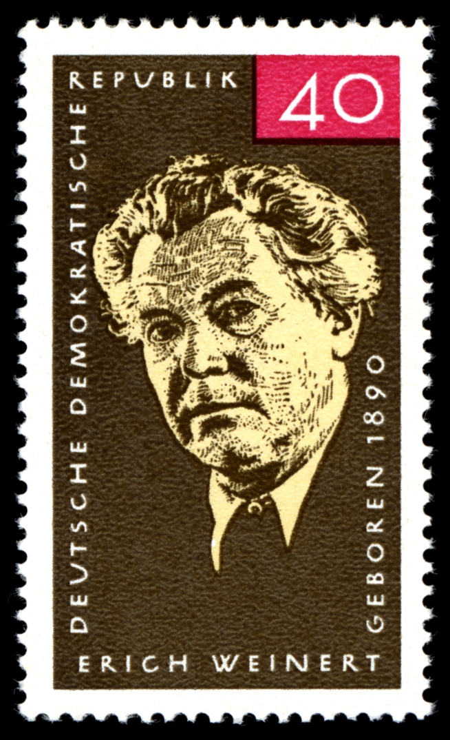 Information Information: Ausgabepreis: Pfennig First Day of Issue / Erstausgabetag: Auflage: Entwurf: Druckverfahren: Michel-Katalog-Nr: Ländercode-MiNr